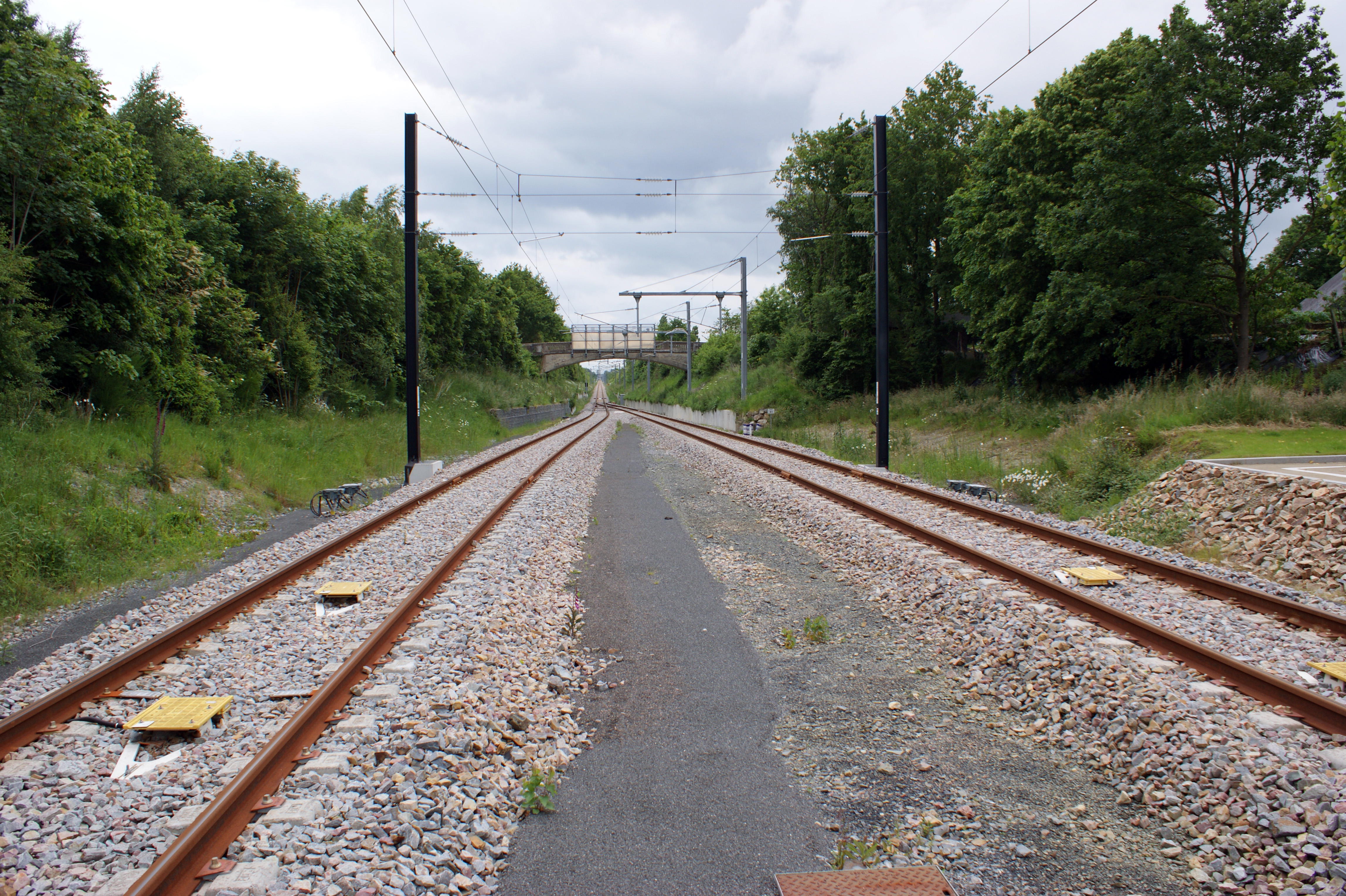 Gare d'Issé, les voies à la sortie de la gare en direction de Châteaubriant.